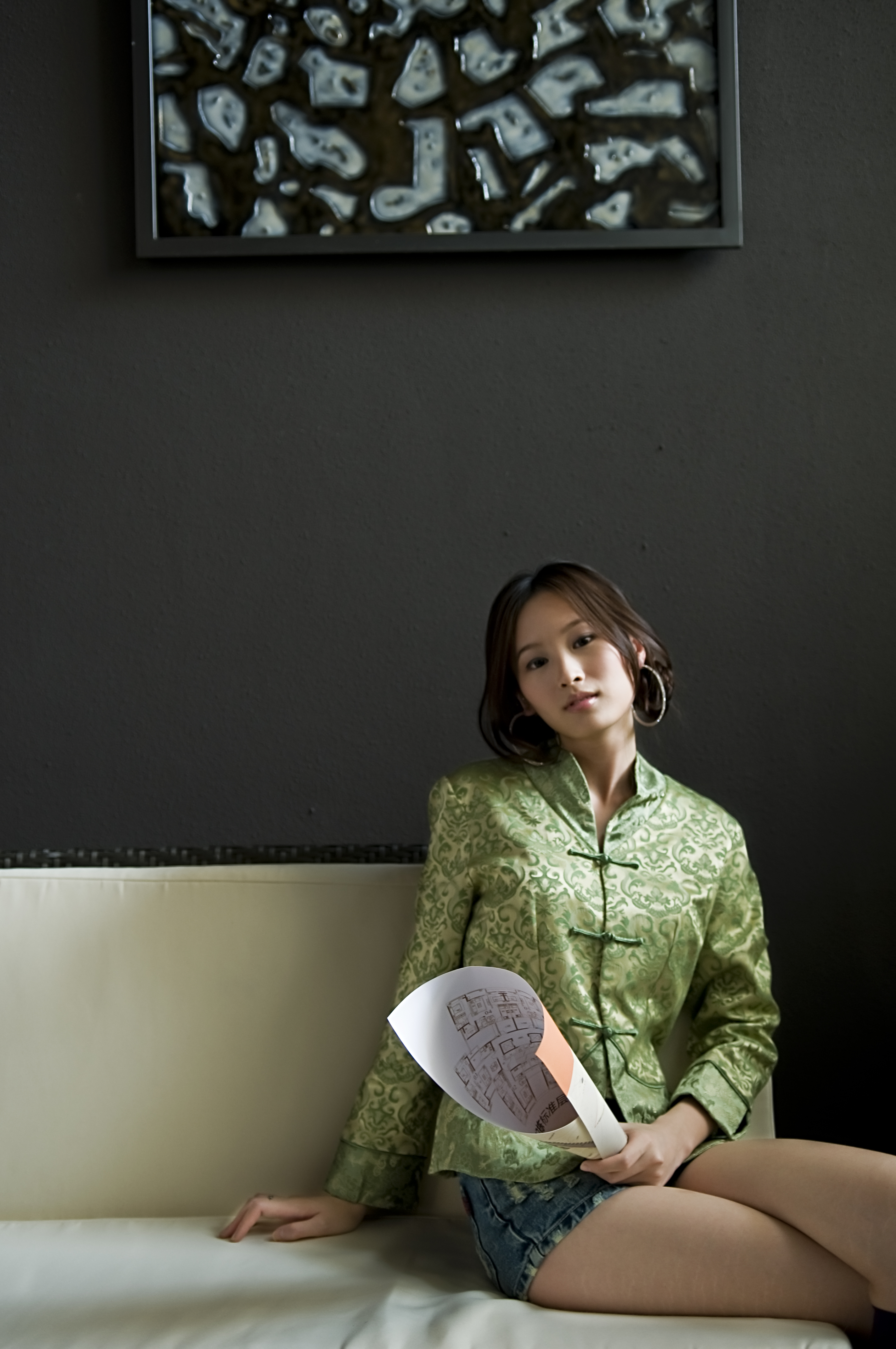 穿着唐装的中国女性